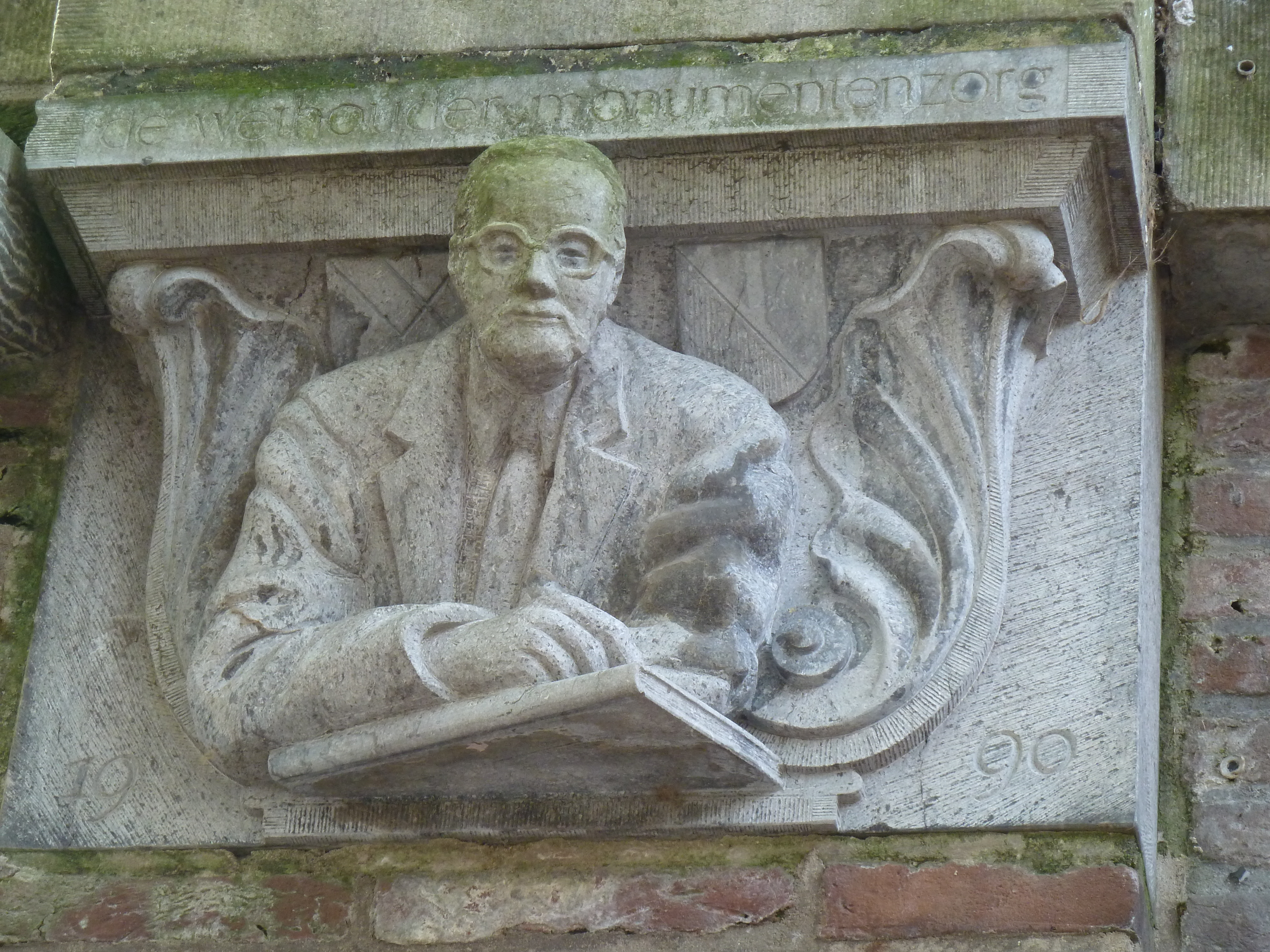 Straatlantaarnconsole thv Oudegracht 205, Utrecht, NL. Wethouder Monumentenzorg